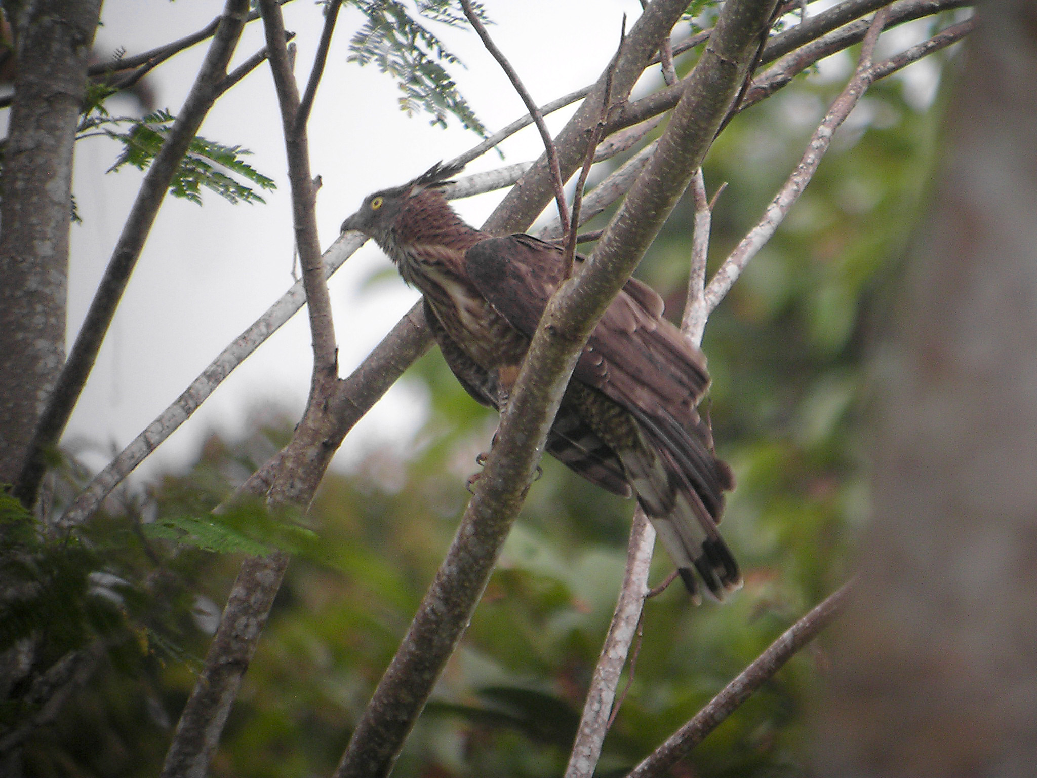 Philippine Honey Buzzard (Pernis steerei), PICOP, Mindanao